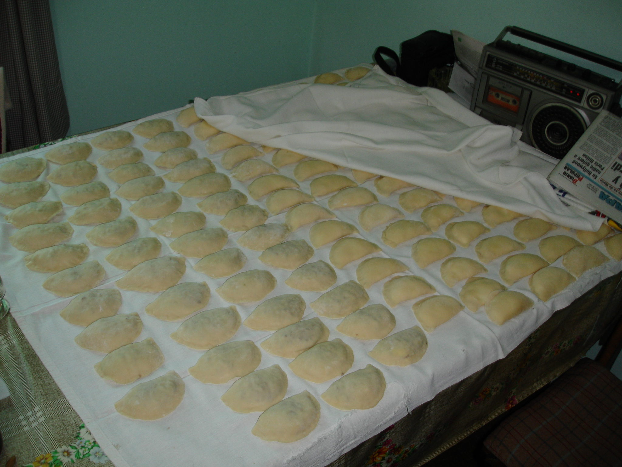 Varenykys crudos listos para ser cocinados, distruibuidos en una mesa sobre un paño, luego de su preparación.